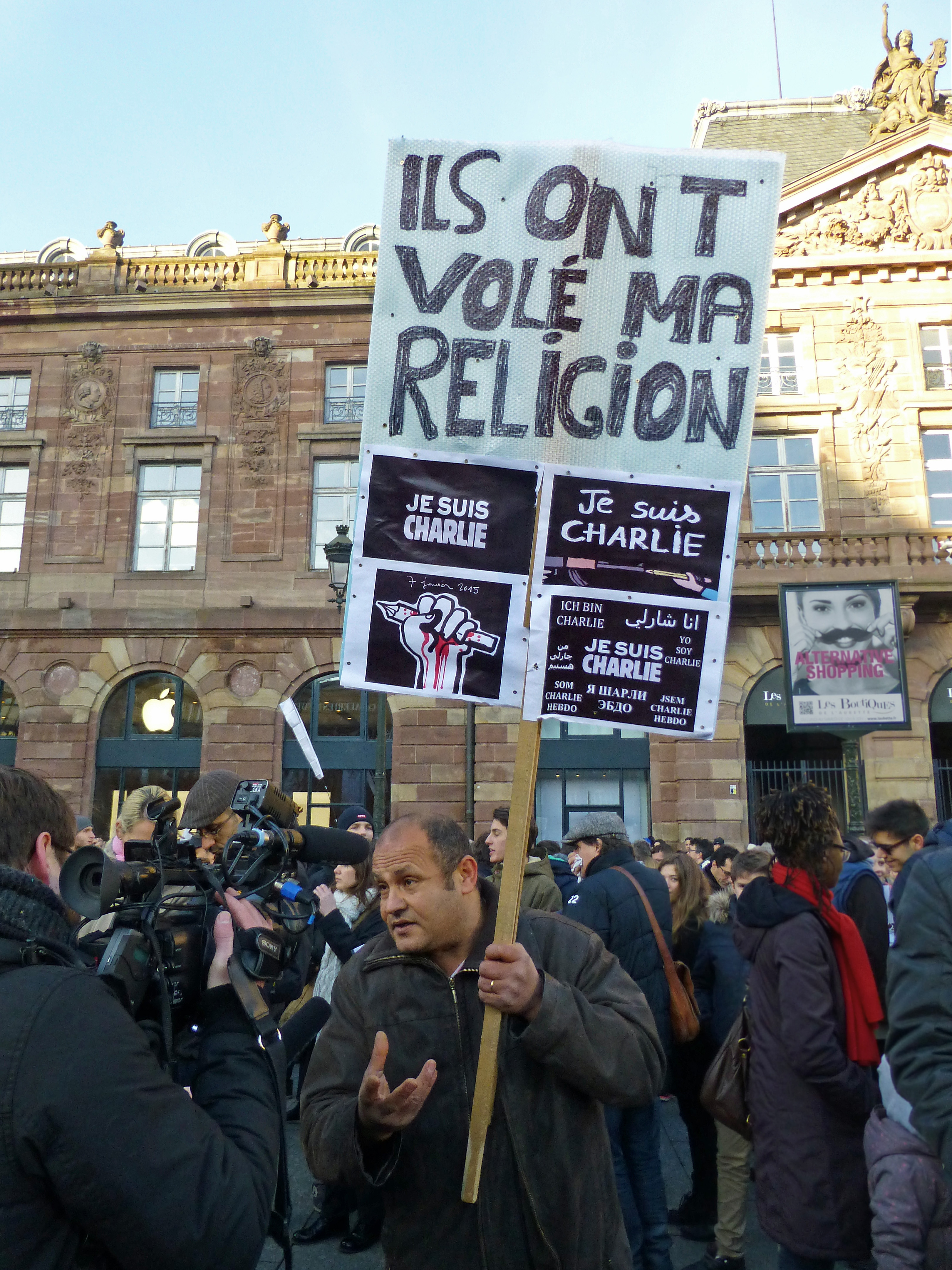 Strasbourg, place Kléber : rassemblement républicain (Charlie Hebdo). Un manifestant musulman s'indigne du fait que les terroristes ont "volé sa religion" en agissant ainsi au nom de l'islam.